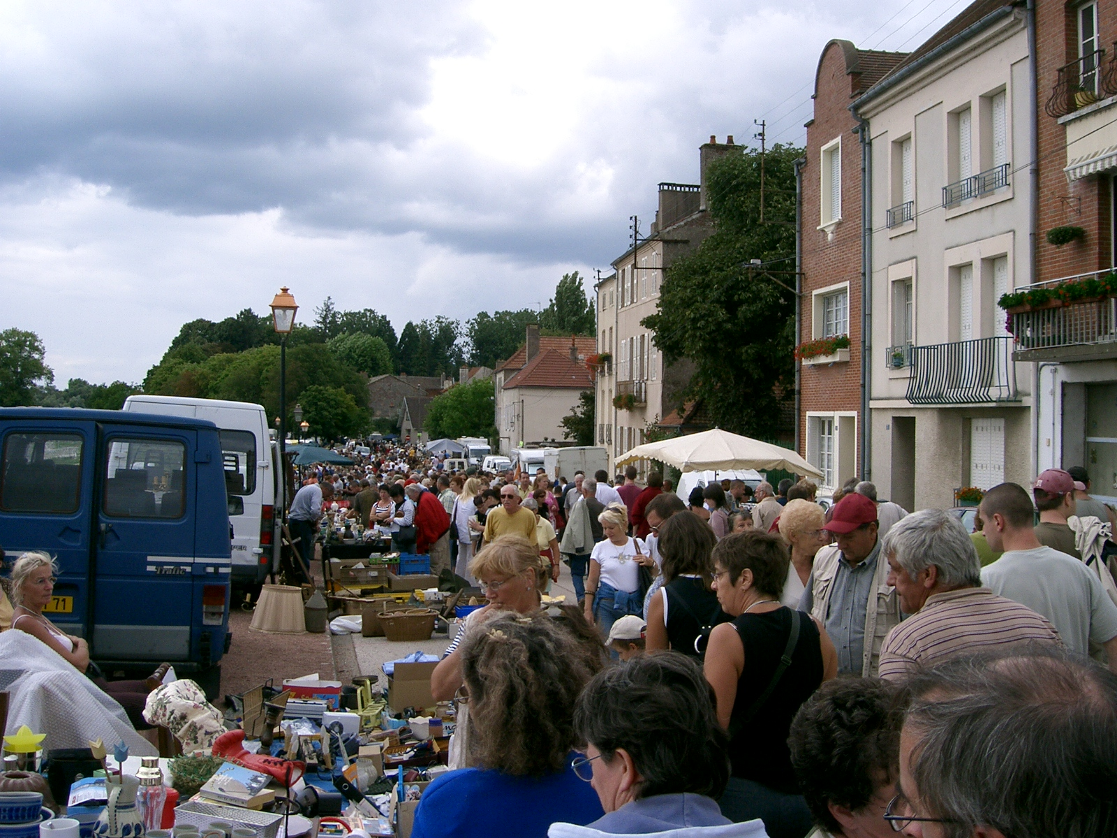 Vide grenier et brocante (France - Seurre -21) self made PRA